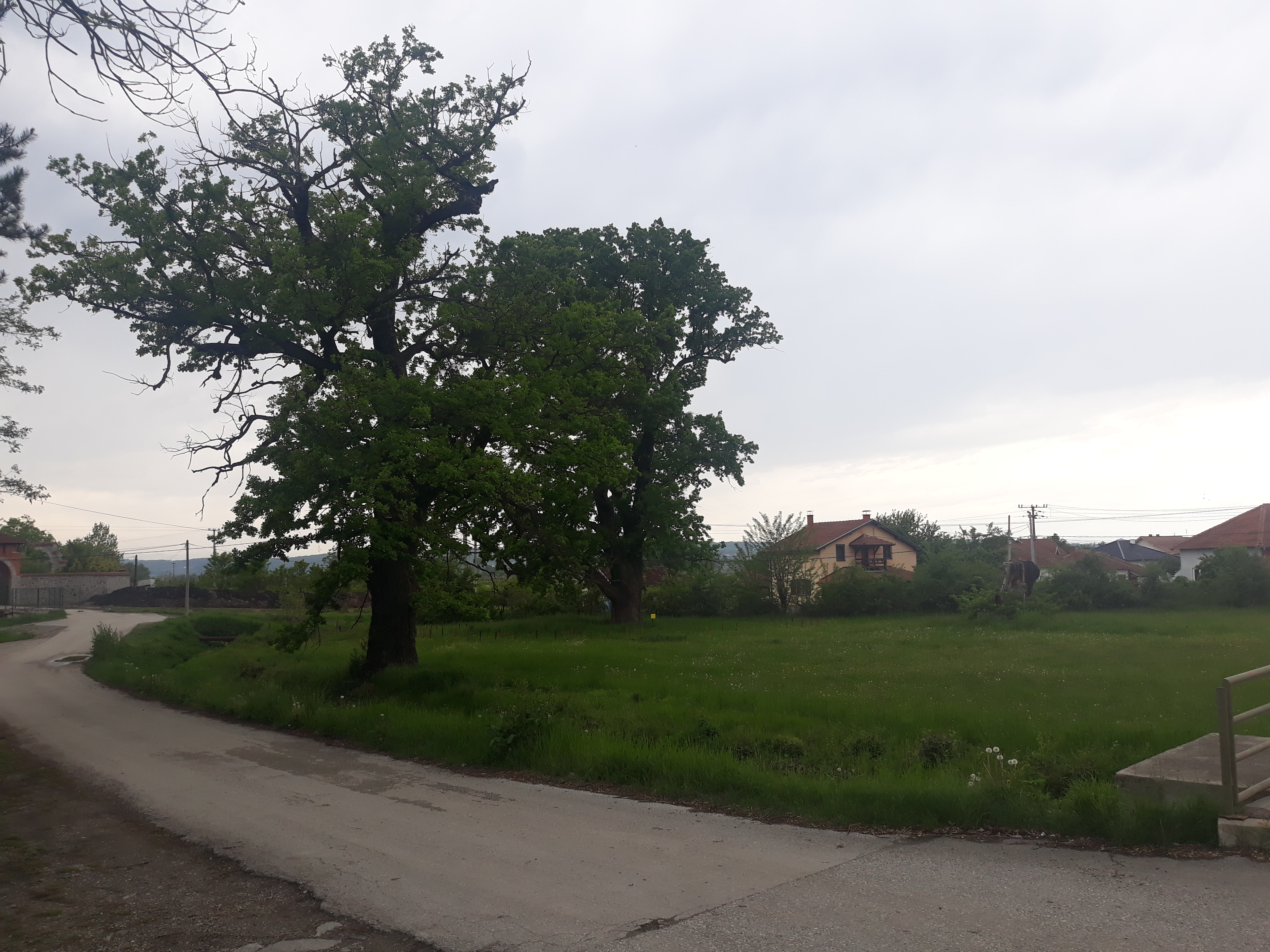 Манастир Жича и околина, фотографисани у априлу 2019. године.